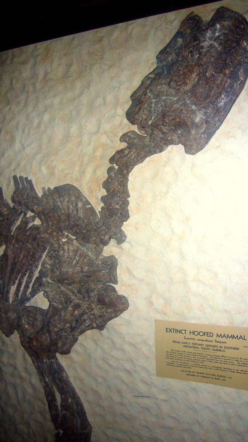 Scarrittia canquelensis Simpson